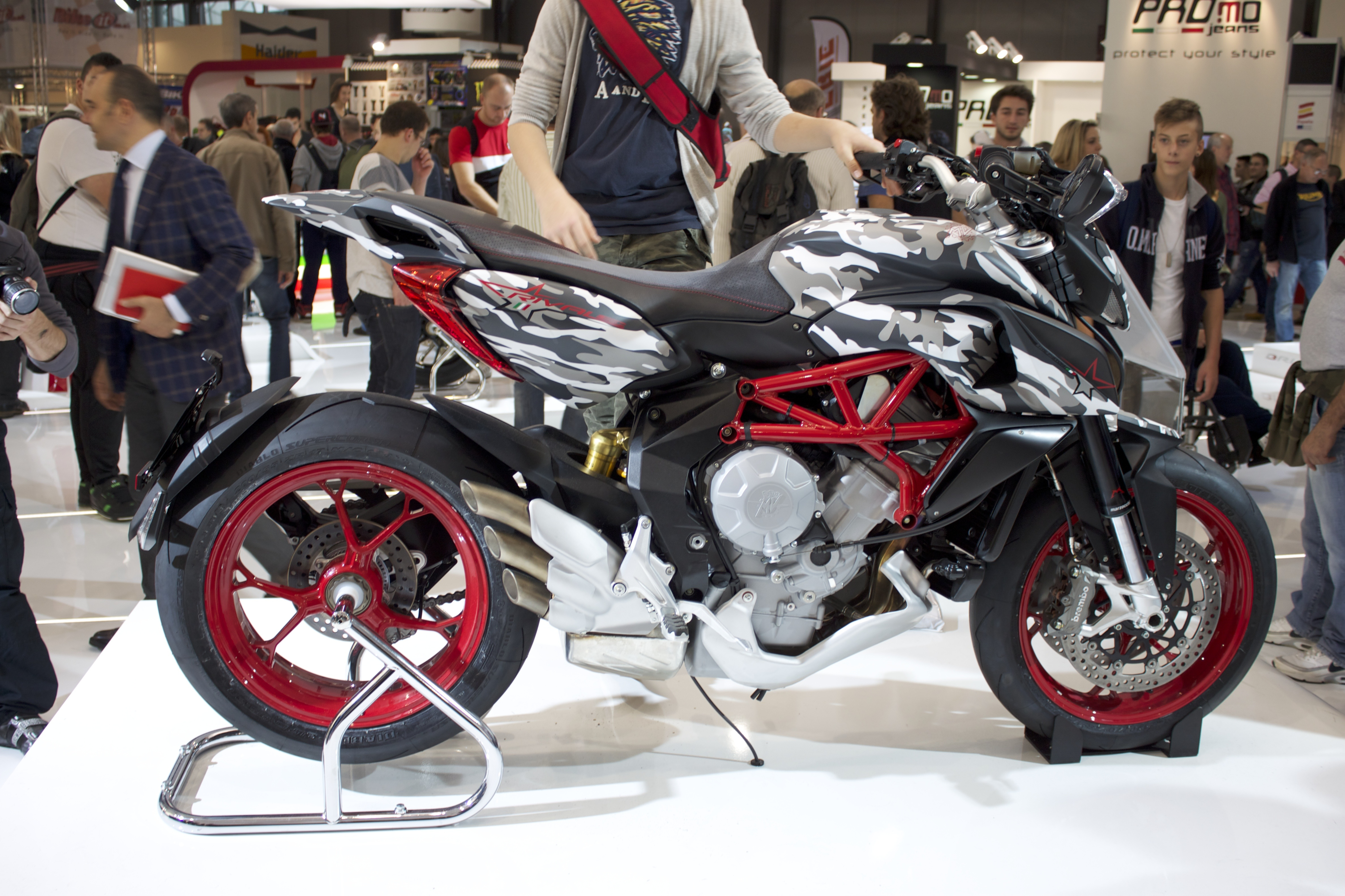 MV Agusta - Rivale 800 "urban camo" Special Edition